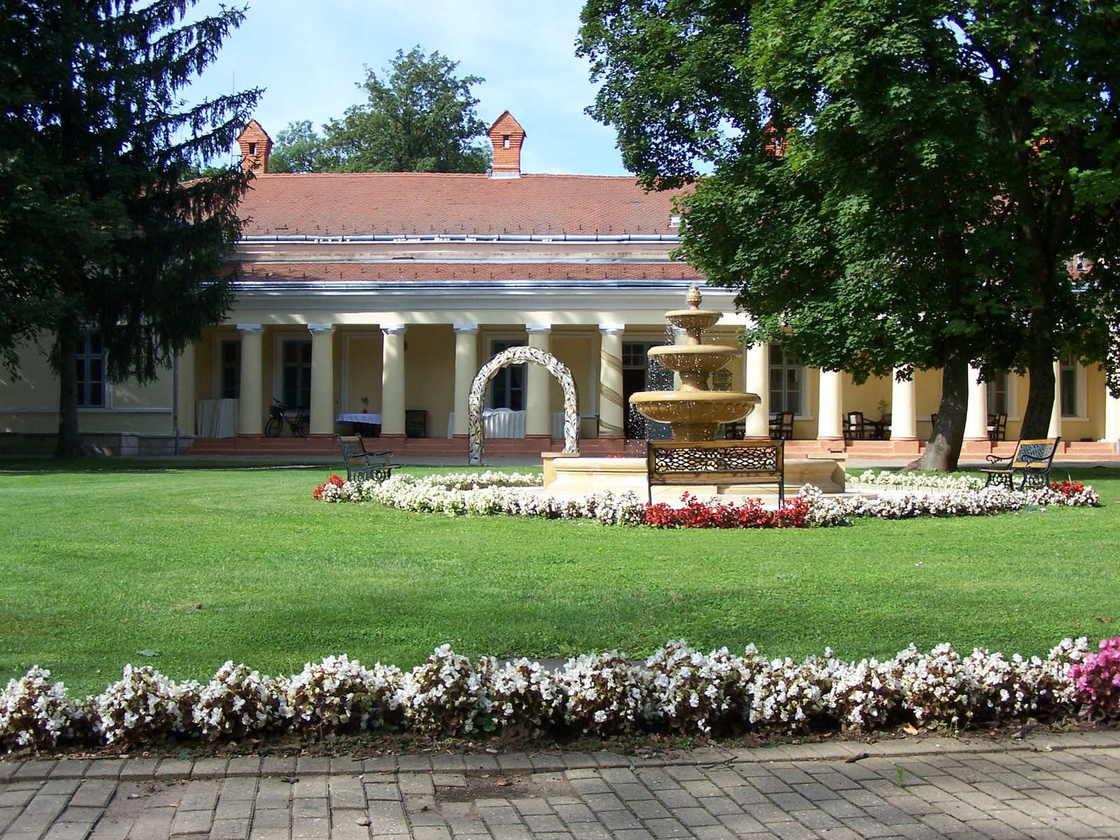 Podmaniczky-kastély (Verseg, Fenyőharasztipuszta) This is a photo of a monument in Hungary. Identifier: 7586